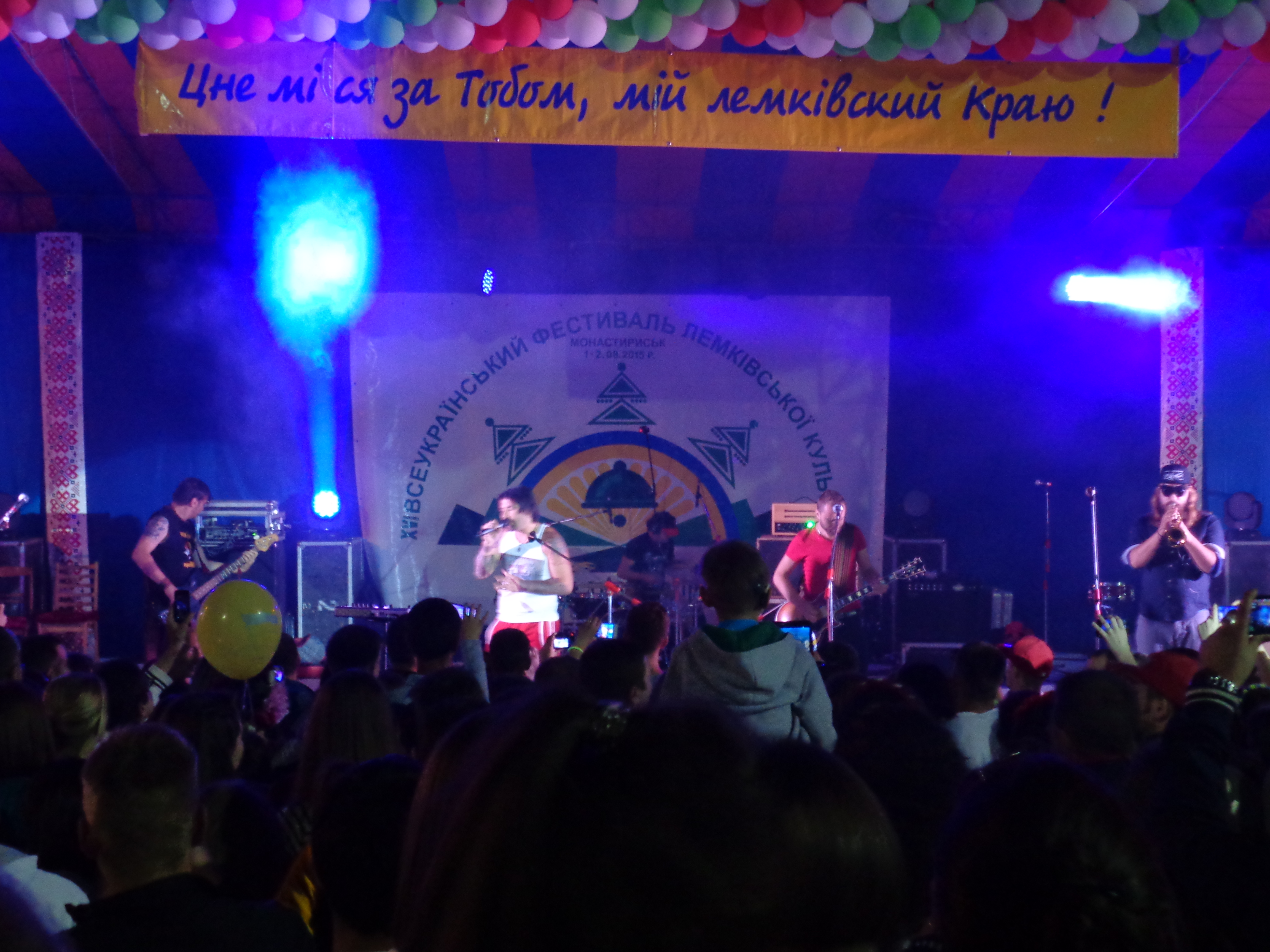 "Kozak System" на фестивалі лемківської культури "Дзвони Лемківщини".